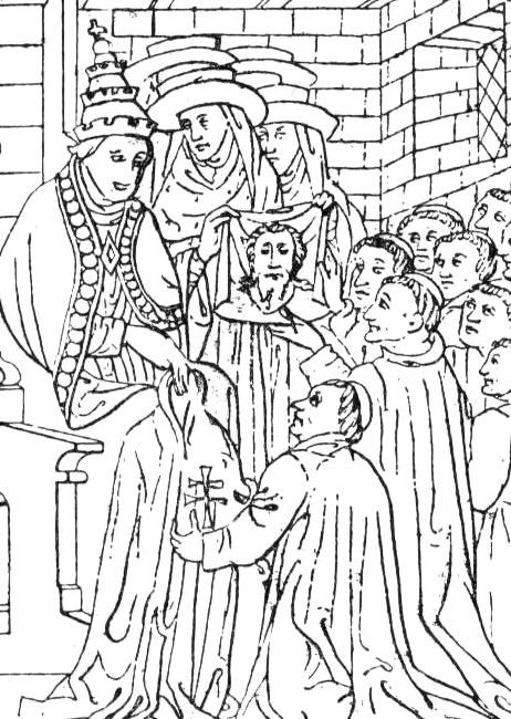 Histoire de l'Ordre Hospitalier du Saint-Esprit Auteur Paul Brune Éditeur C. Martin, 1892